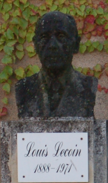 Buste de Louis Lecoin à Saint-Amand-Montrond, Cher, France